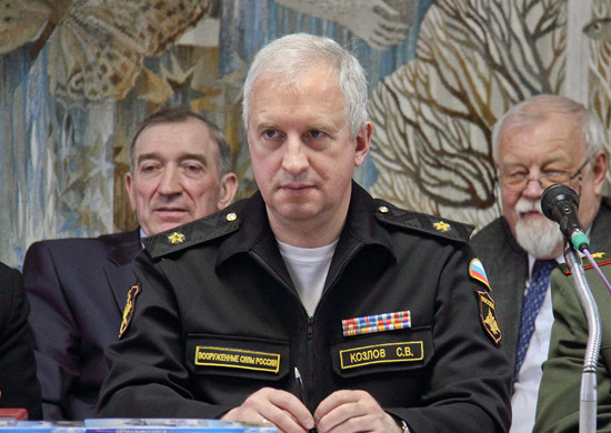 Козлов Сергей Викторович - Начальник Военно-топографического управления Генерального штаба (с 2010 по 2015 гг.)